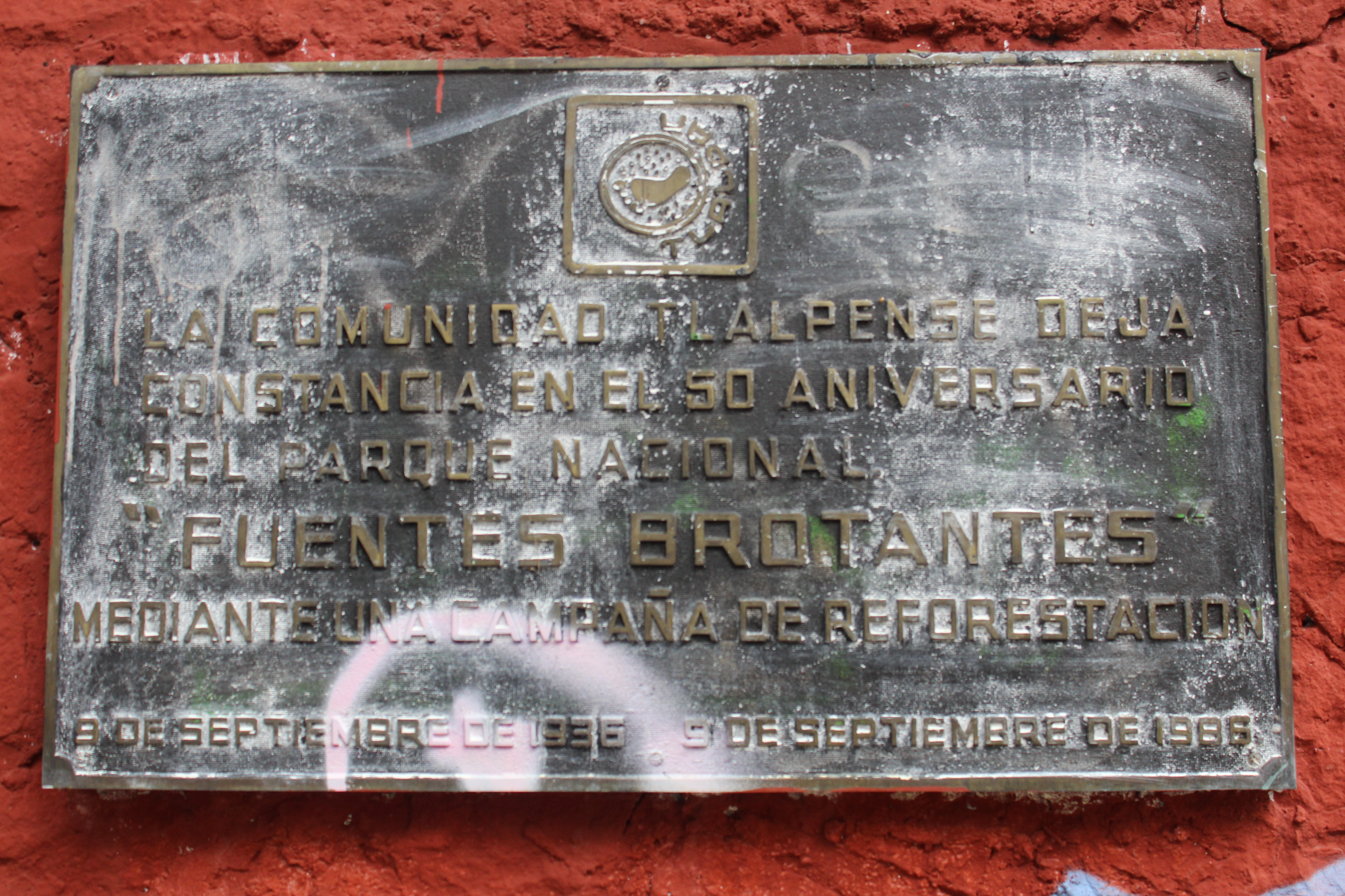 Placa de constancia del 50 aniverario del Parque Nacional Fuentes Brotantes, en Tlalpan en la Ciudad de México y su reforestación